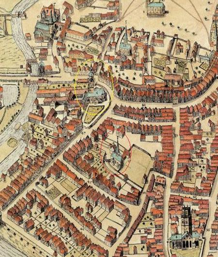 Ausschnitt aus dem Vogelschau-Plan der Stadt Münster von Everhard Alerdinck: gelb umrandet die Pfarrkirche St. Aegidii (1821 eingestürzt und abgerissen, heute Aegidiimarkt), rot umrandet die Klosterkirche der Kapuziner, die nach 1821 Pfarrkirche der Aegidiengemeinde wurde und seitdem St. Aegidii heißt; links oben St. Petri, rechts oben der Domplatz, rechts unten St. Ludgeri